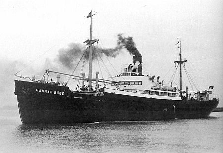 Der deutsche Frachter ``Hannah Böge``